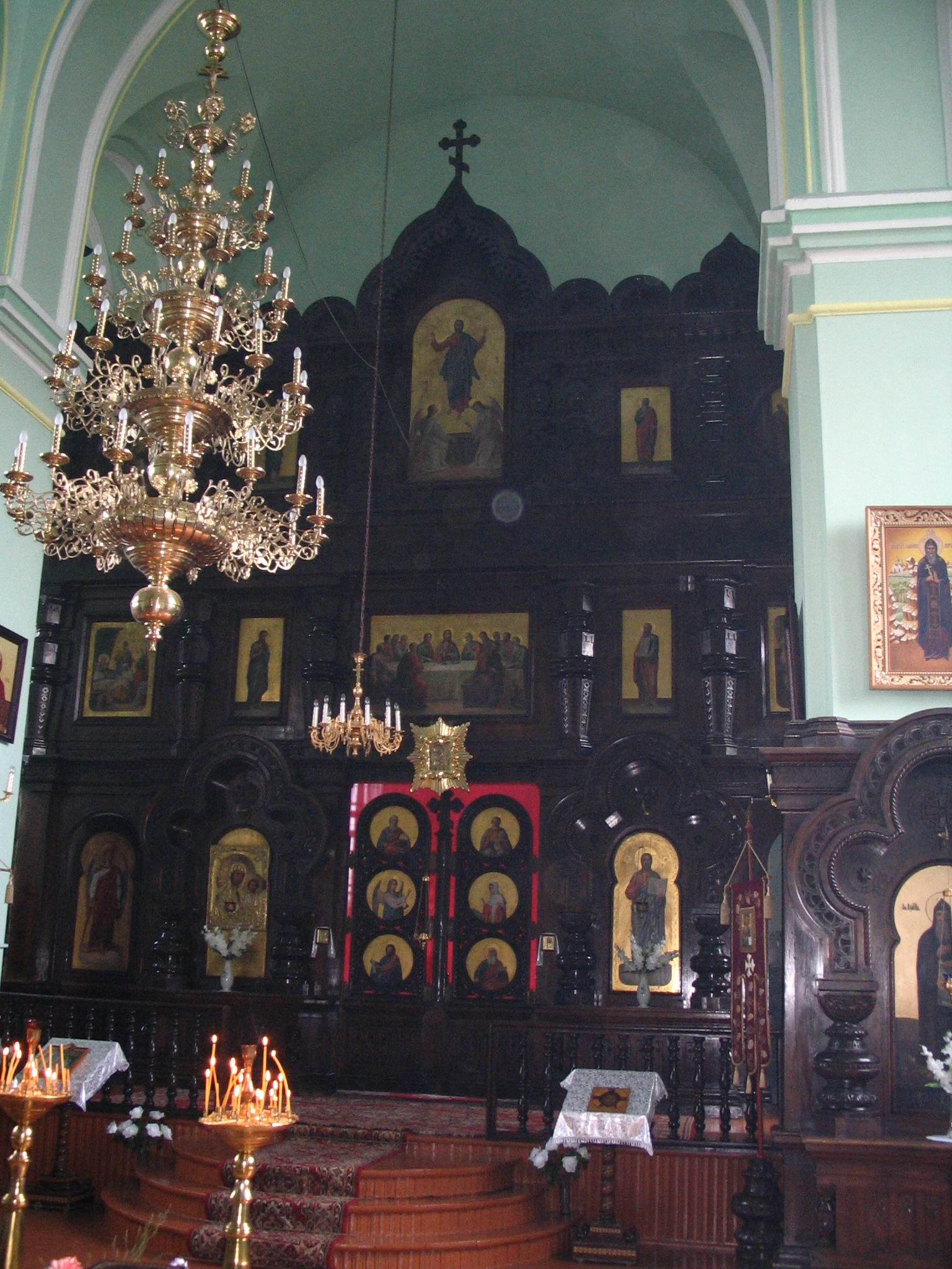 Беларуская (тарашкевіца): Сьвята-Сімяонаўская царква (Камянец) This is a photo of Belarusian heritage monument. Reference number: 113Г000323 ( WLM)